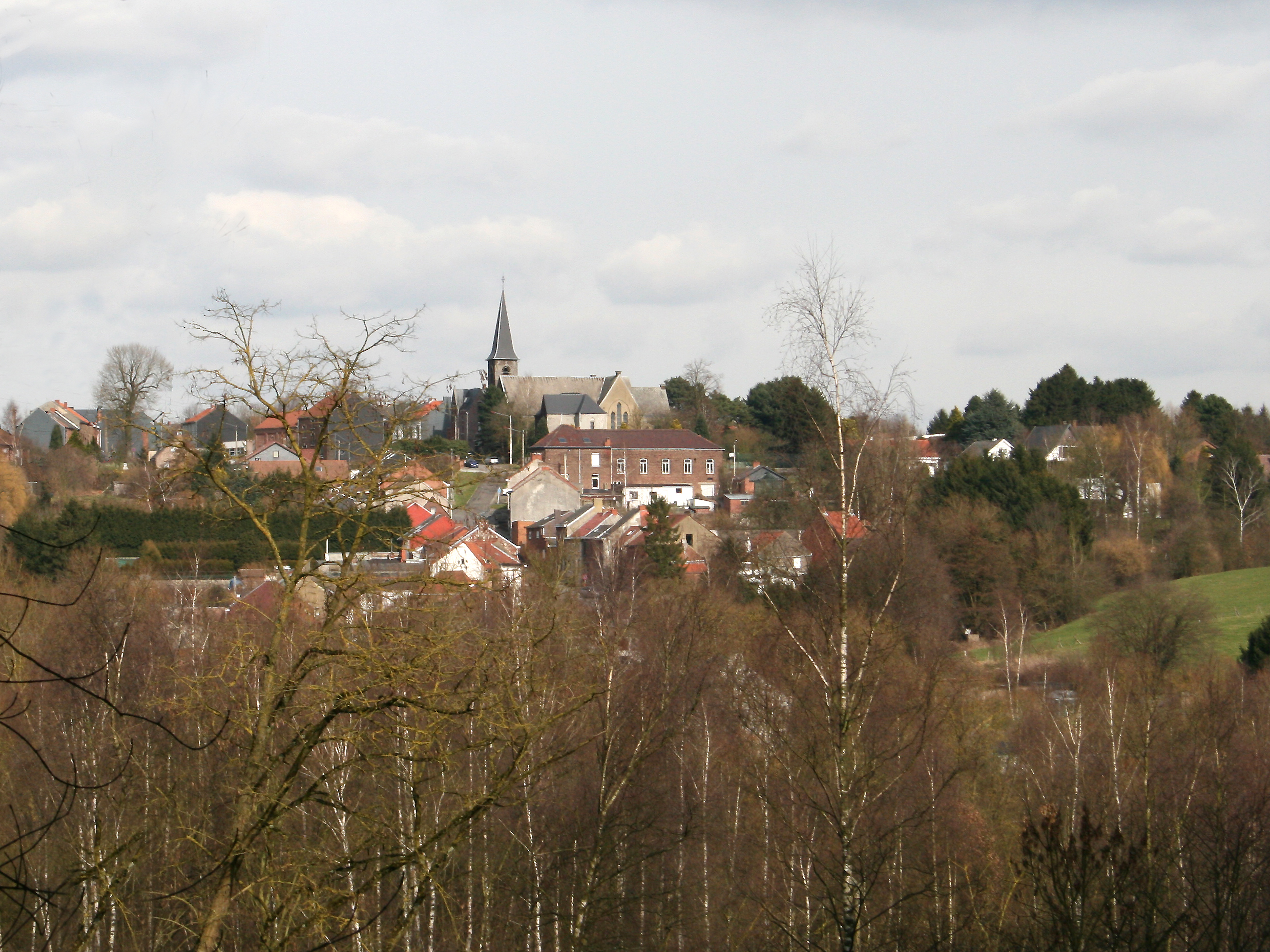 Viesville (Belgique), le village.